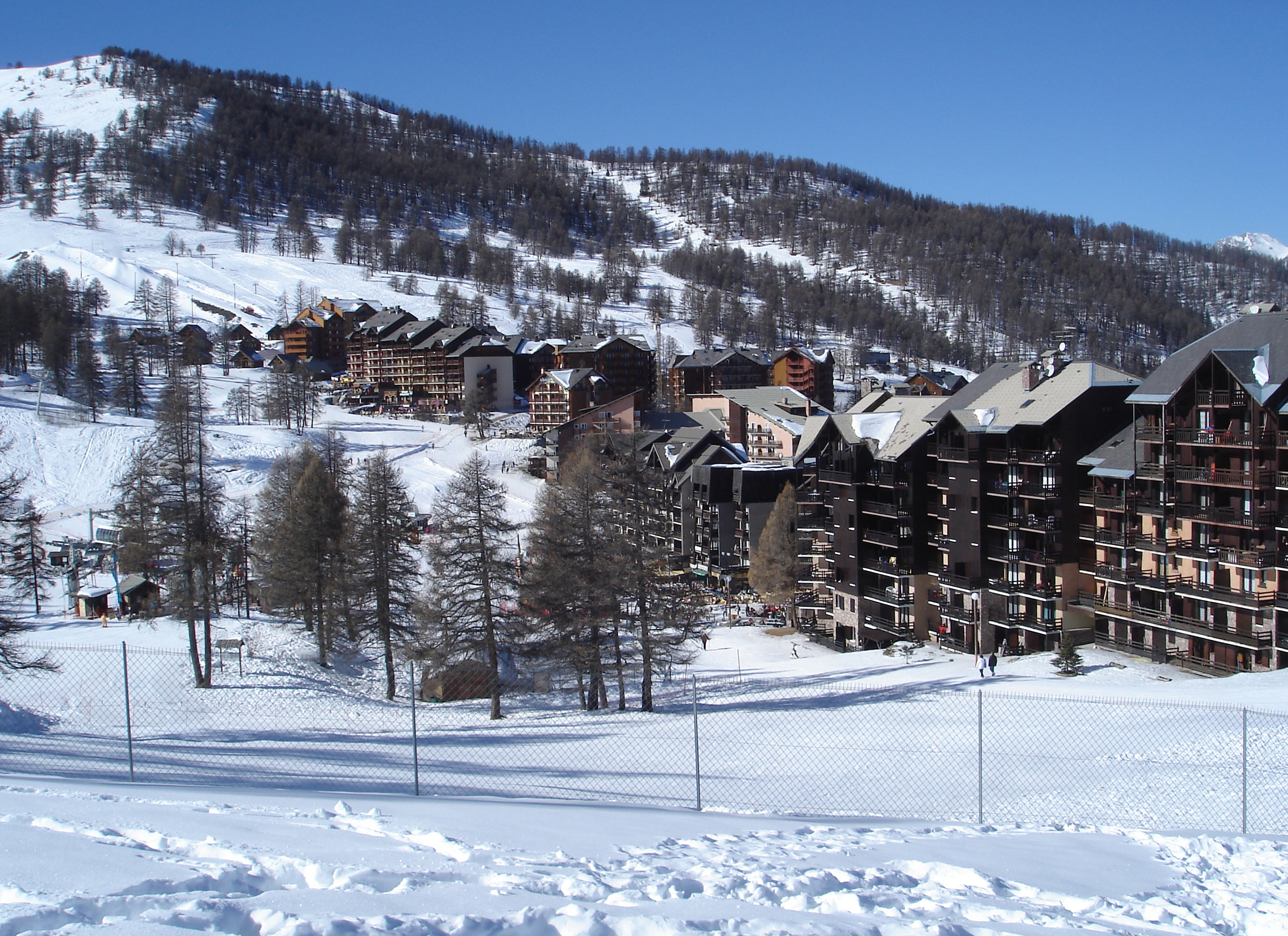 Ville de Risoul-Hautes-Alpes